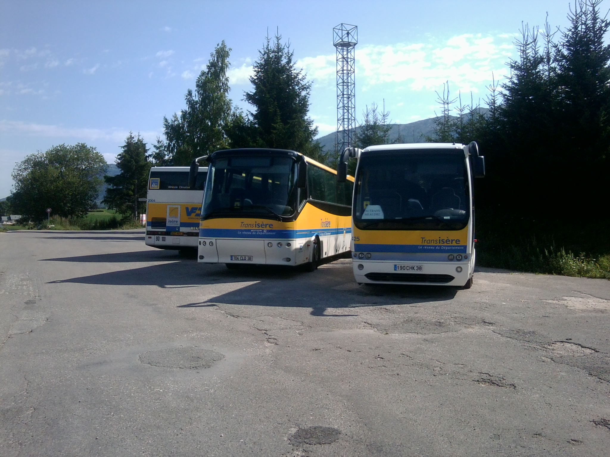 Les autocars Transisère (transporteur VFD), aux dépôt de la maison du conseil général de Villard-de-Lans.